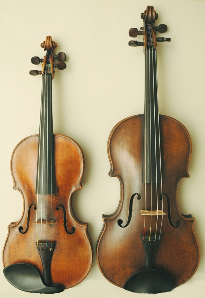 Difference / Unterschied Violin - Bratsche (Viola Alto) 40 cm